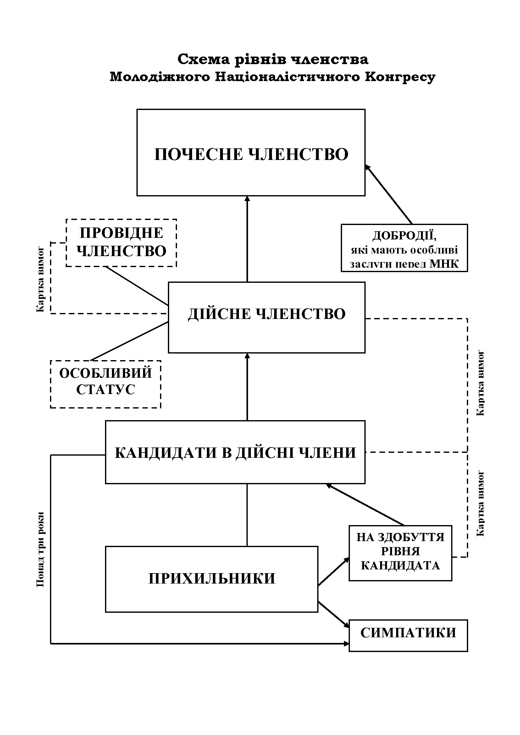 Схема рівнів членства Молодіжного Націоналістичного Конгресу